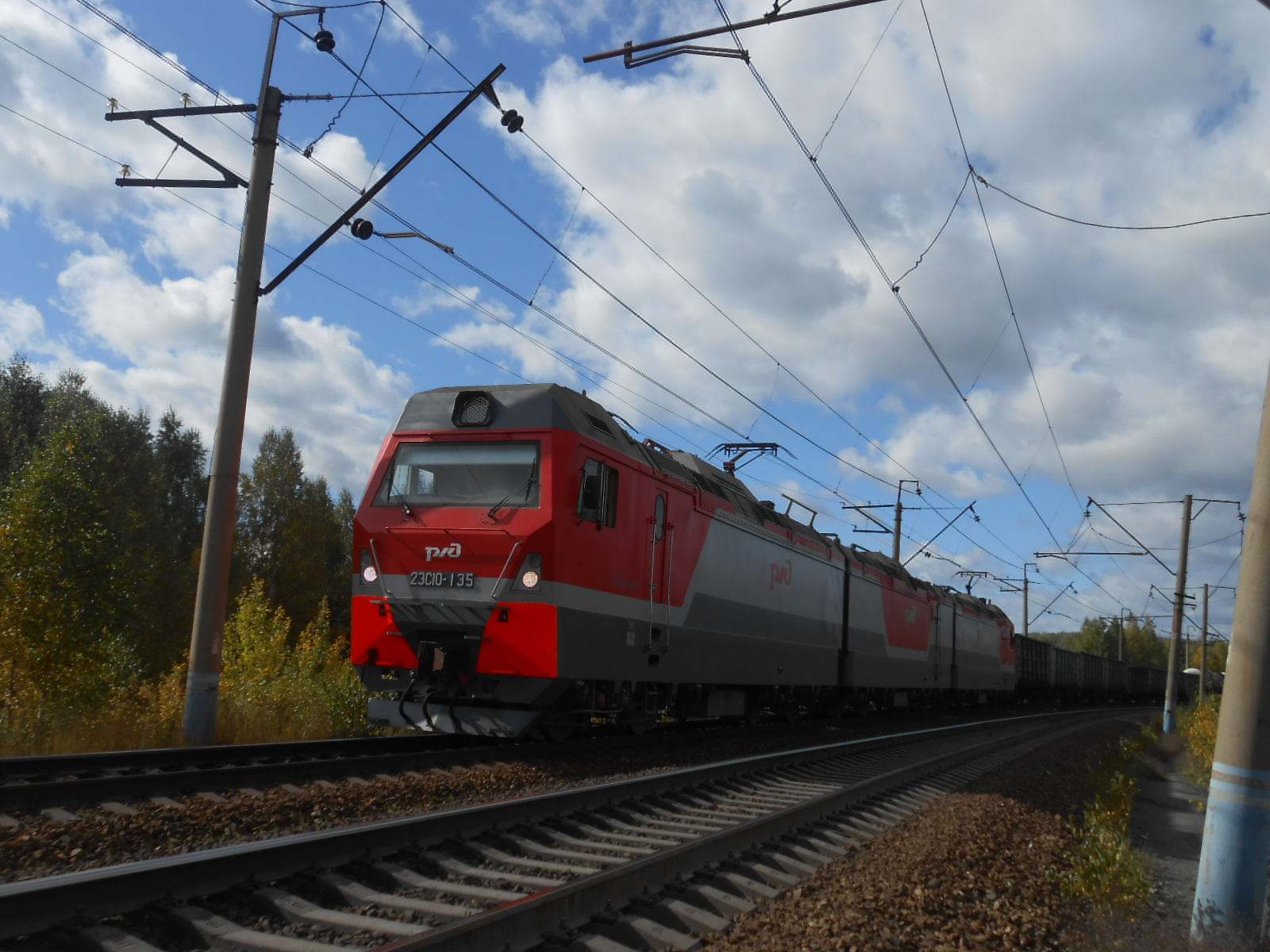 Электровоз 2ЭС10-135 (3ЭС10) с грузовым поездом. Свердловская область, Россия